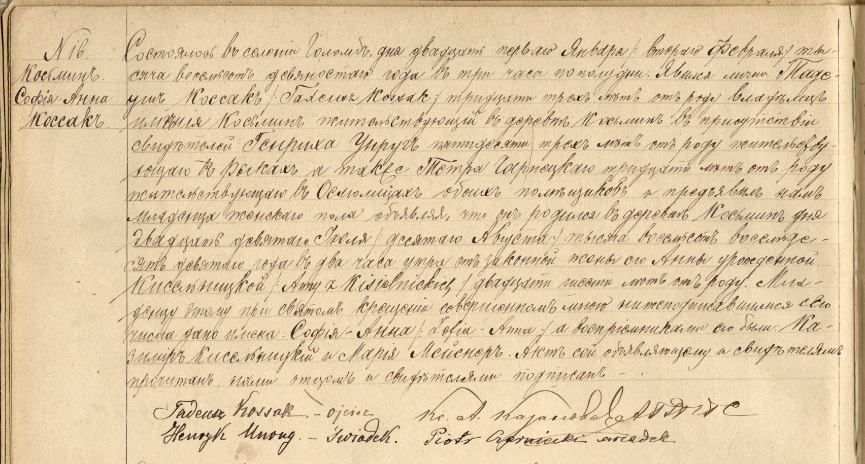 Akt urodzenia i chrztu Zofii Kossak